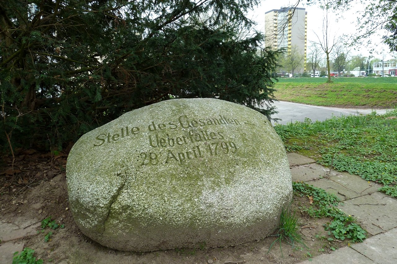 Gedenkstein an den Rastatter Gesandtenmord. Der Stein befindet sich in einem kleinen Park in der Nähe der Strassenkreuzung "Am Gedenkstein" und "Kinkelstrasse".